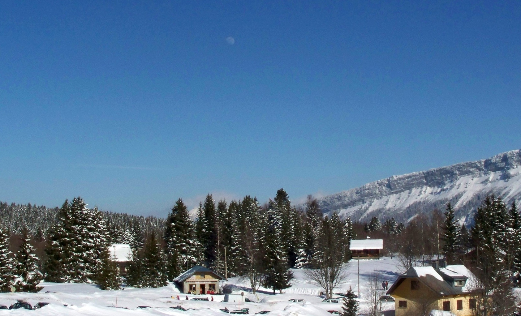 La Féclaz en Savoie (France). Station de Ski.